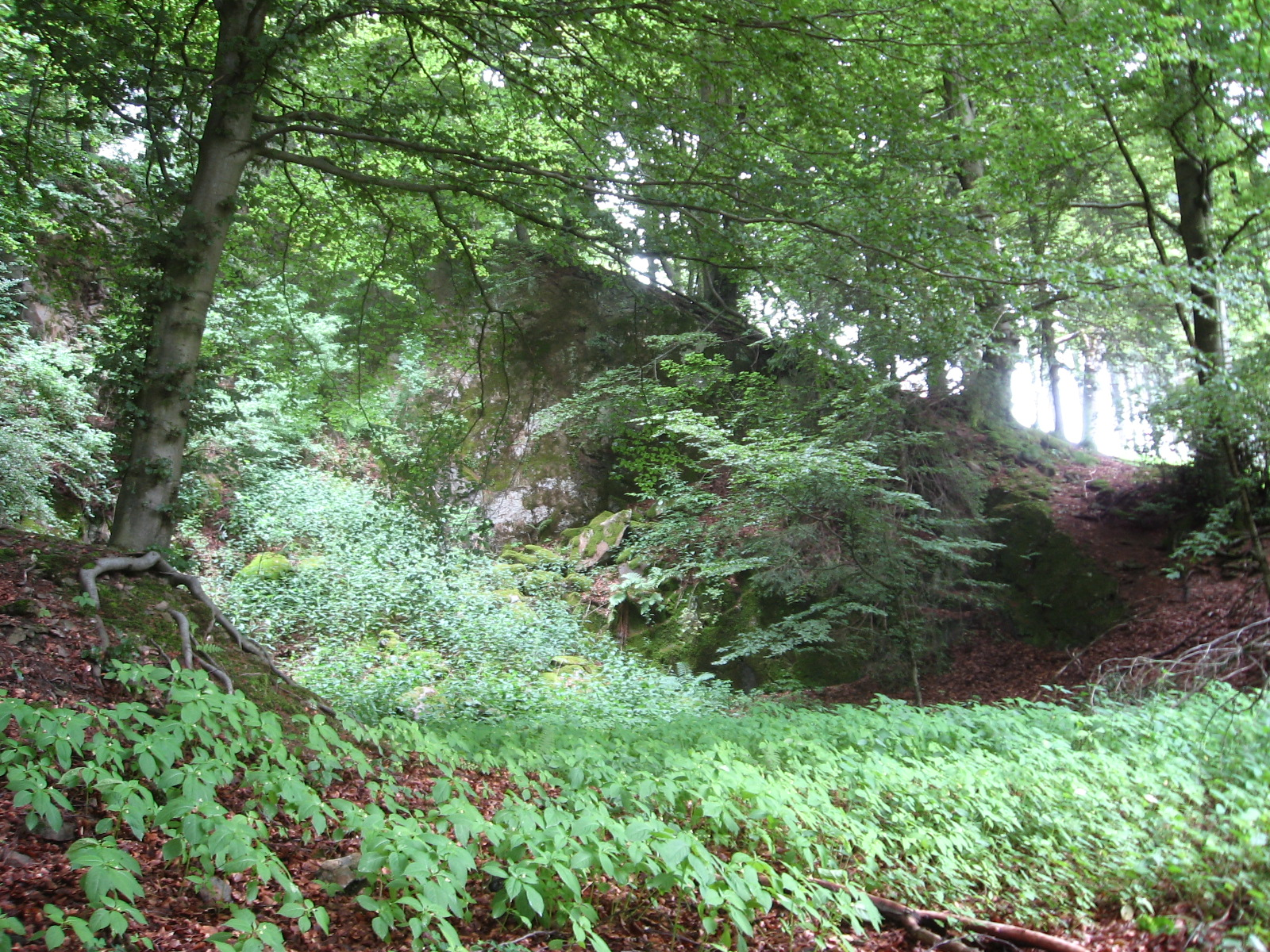 Alte Bergwerkspinge am Eisenberg bei Olsberg im Sauerland (NRW).